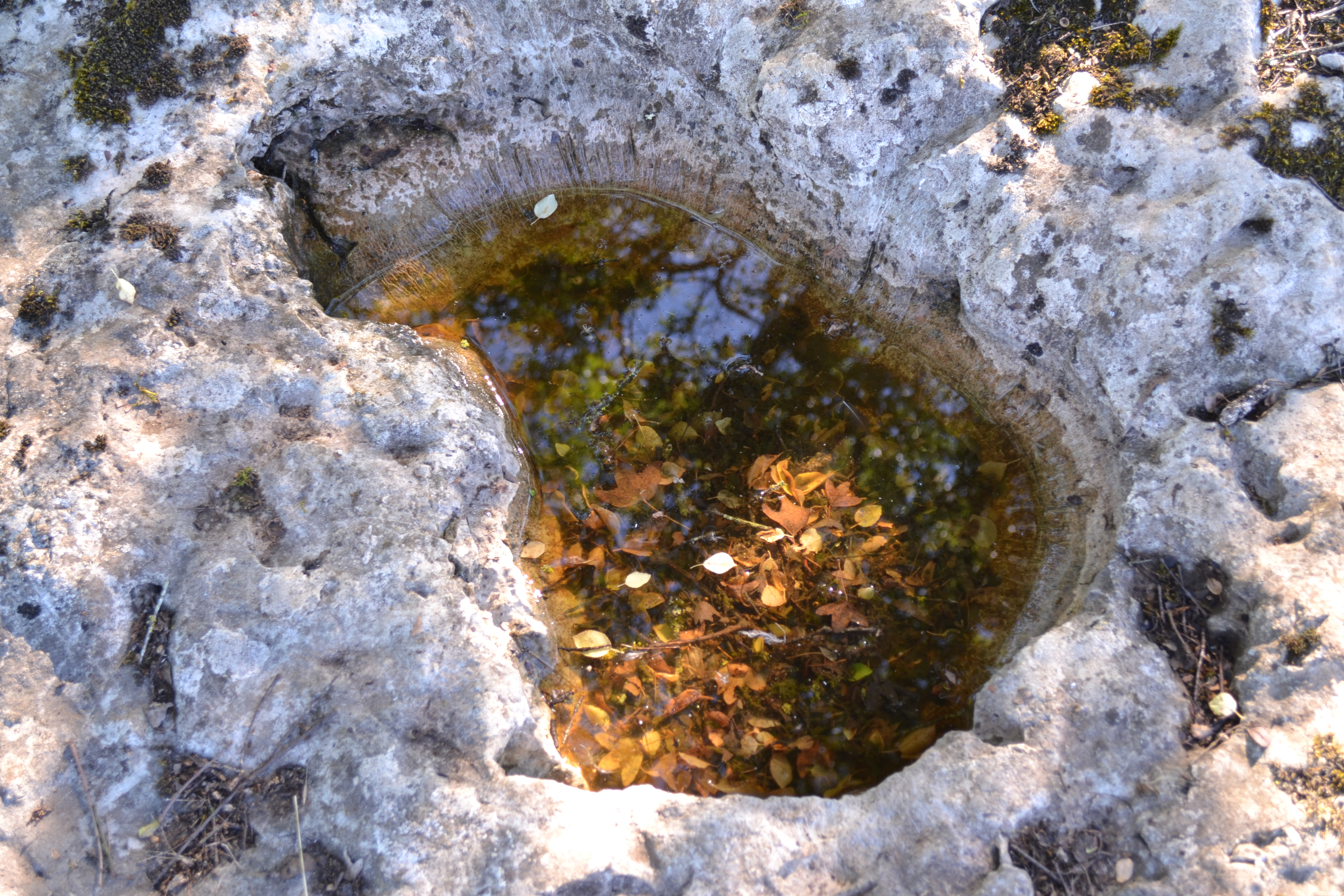 Dolmen de la Baune (bassin), Issendolus, Lot